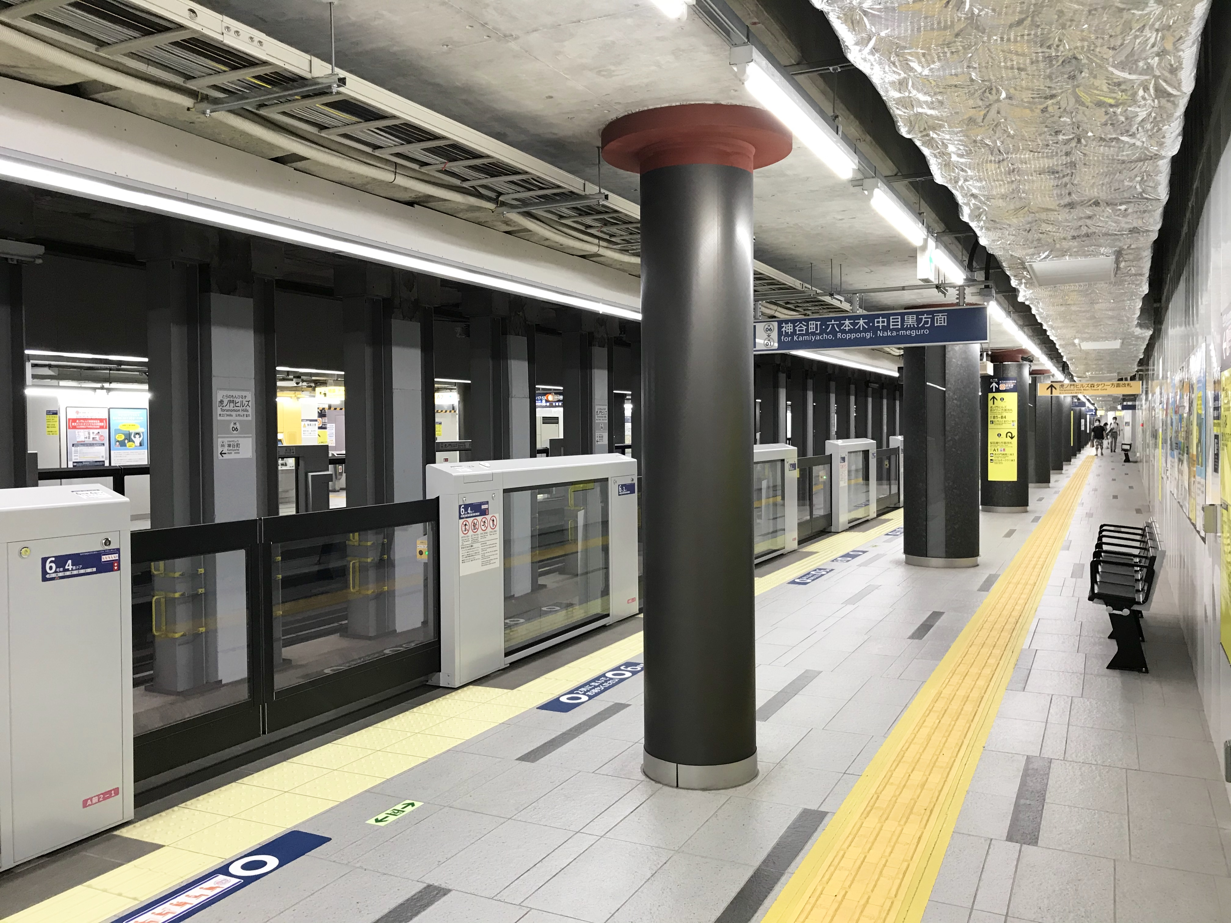 東京メトロ日比谷線虎ノ門ヒルズ駅ホーム（仮設）